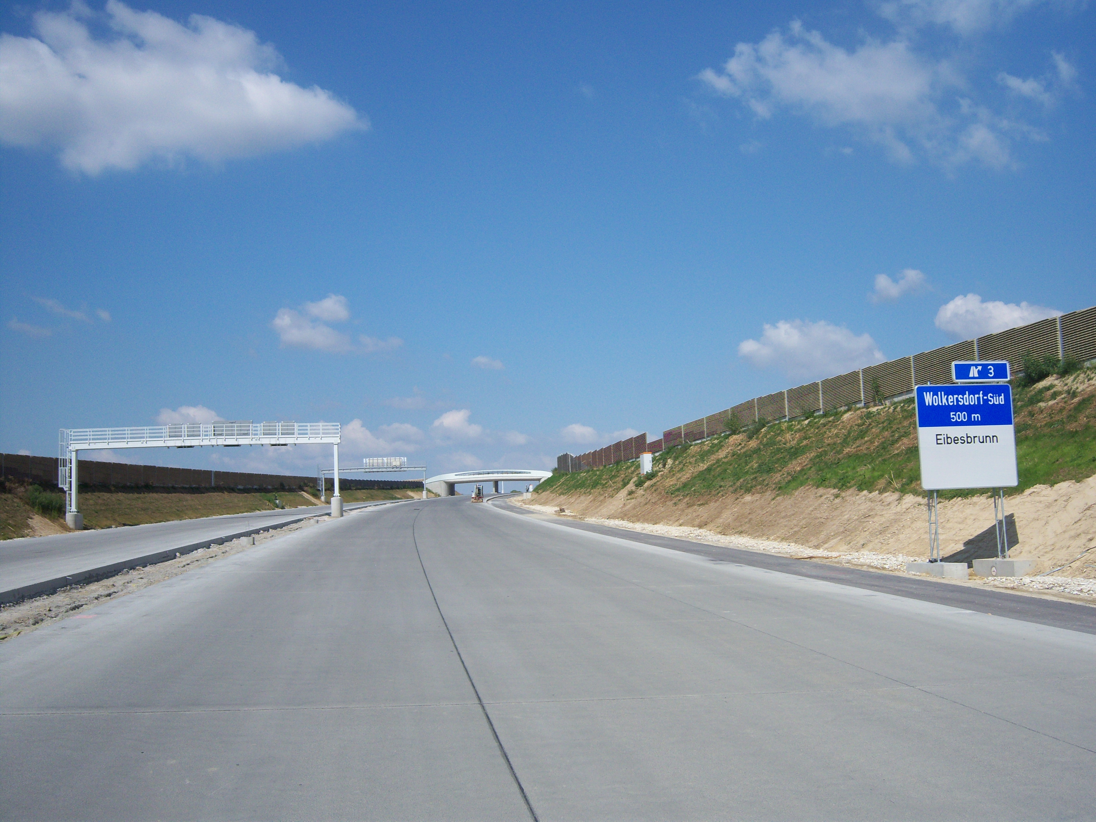 Nord Autobahn A5 im Bereich der Anschlussstelle Wolkersdorf-Süd